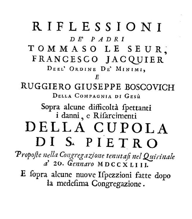 Occhietto